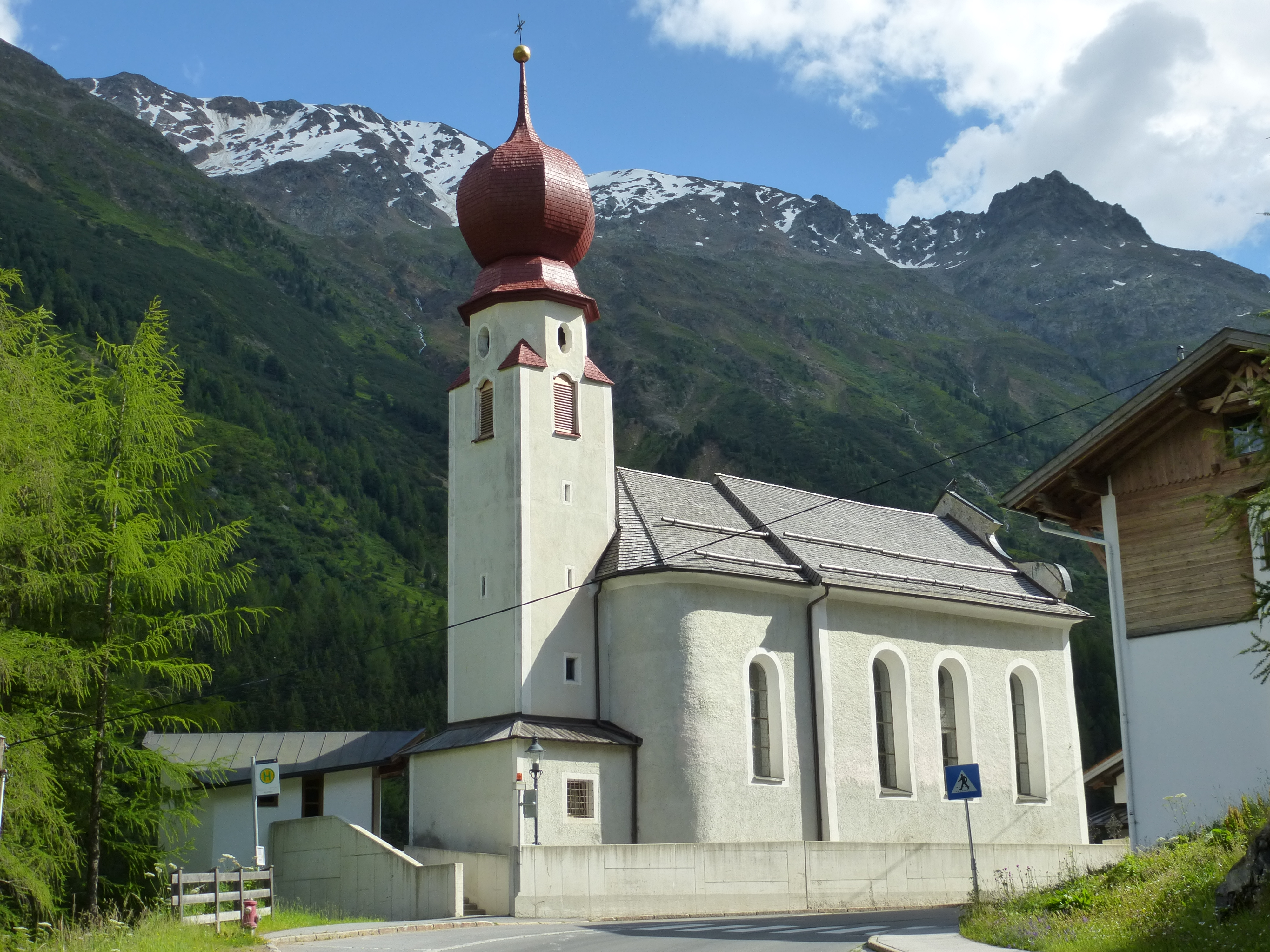 Kaplaneikirche zur Kreuzauffindung und Friedhof mit Kapelle in Heiligkreuz